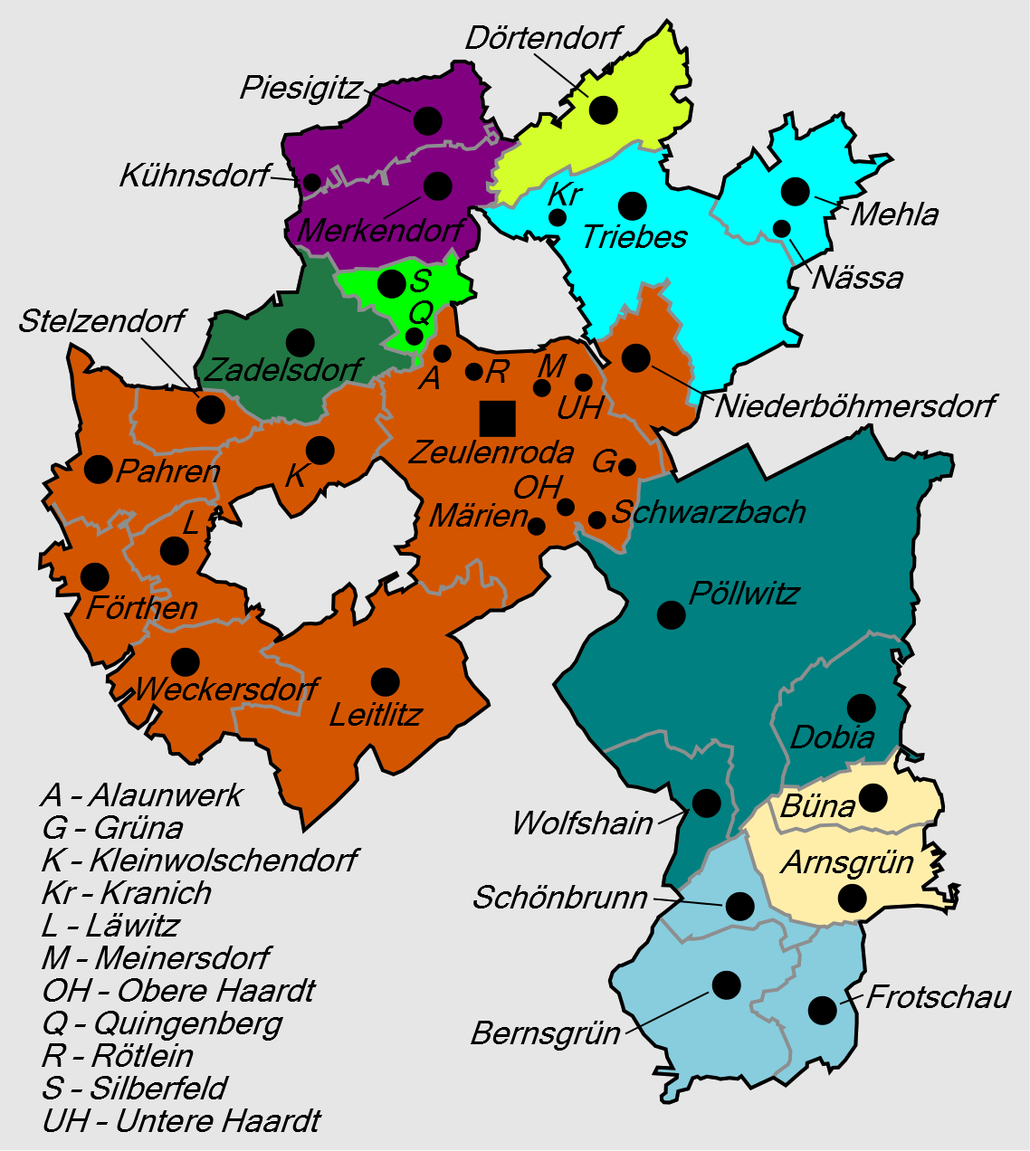 Gliederung der Stadt Zeulenroda-Triebes ab 1. Mai 1994